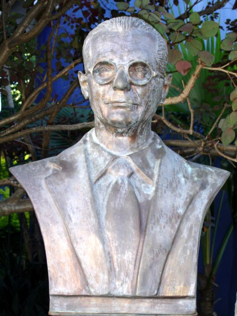 Busto em homenagem ao educador Anísio Teixeira, localizado em sua cidade natal Caetité, Bahia, Brazil. Author: Divisão de Cultura do Município de Caetité. Fotógrafo: Paulo Adriano de Jesus Gonçalves (Ninja), expressamente autorizado pela entidade através de seu Gerente, André Koehne, na licença abaixo especificada como seu próprio trabalho, e dentro das especificações GNU.